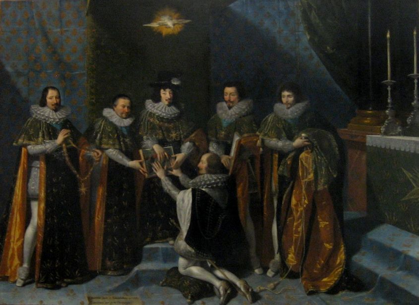 Réception d'Henri d'Orléans, Duc de Longueville, dans l'ordre du Saint-Esprit par le roi Louis XIII, le 15 mai 1633